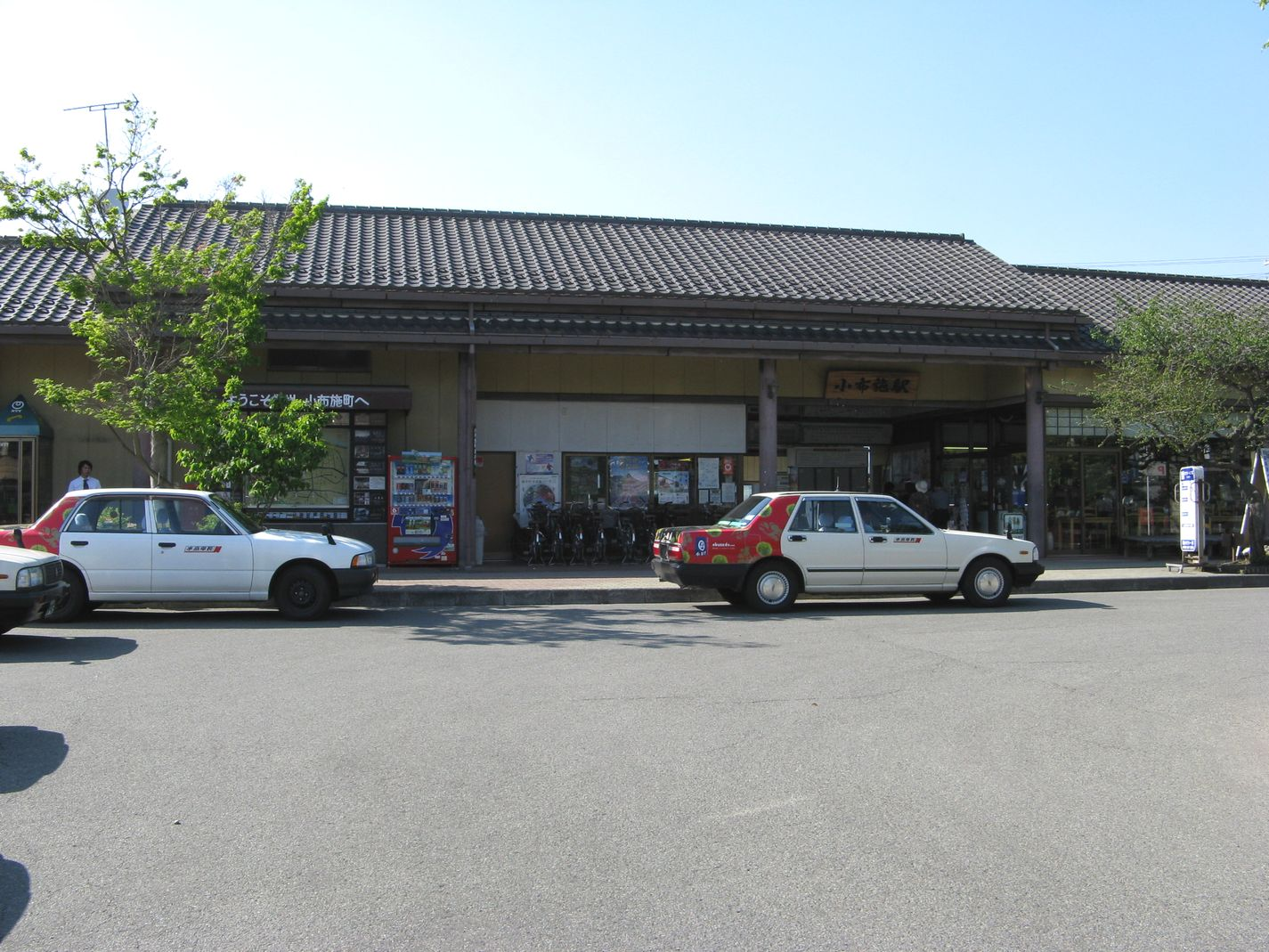 長野電鉄長野線 小布施駅